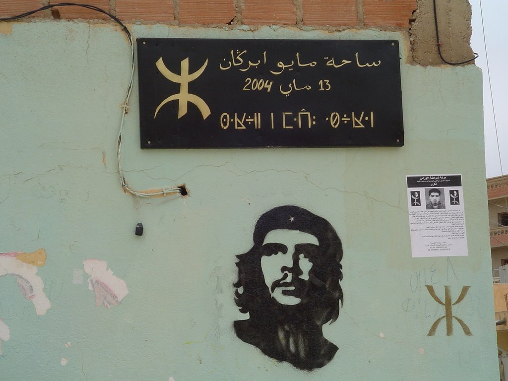 Place 13 mai a T'Kout (Wilaya de Batna)